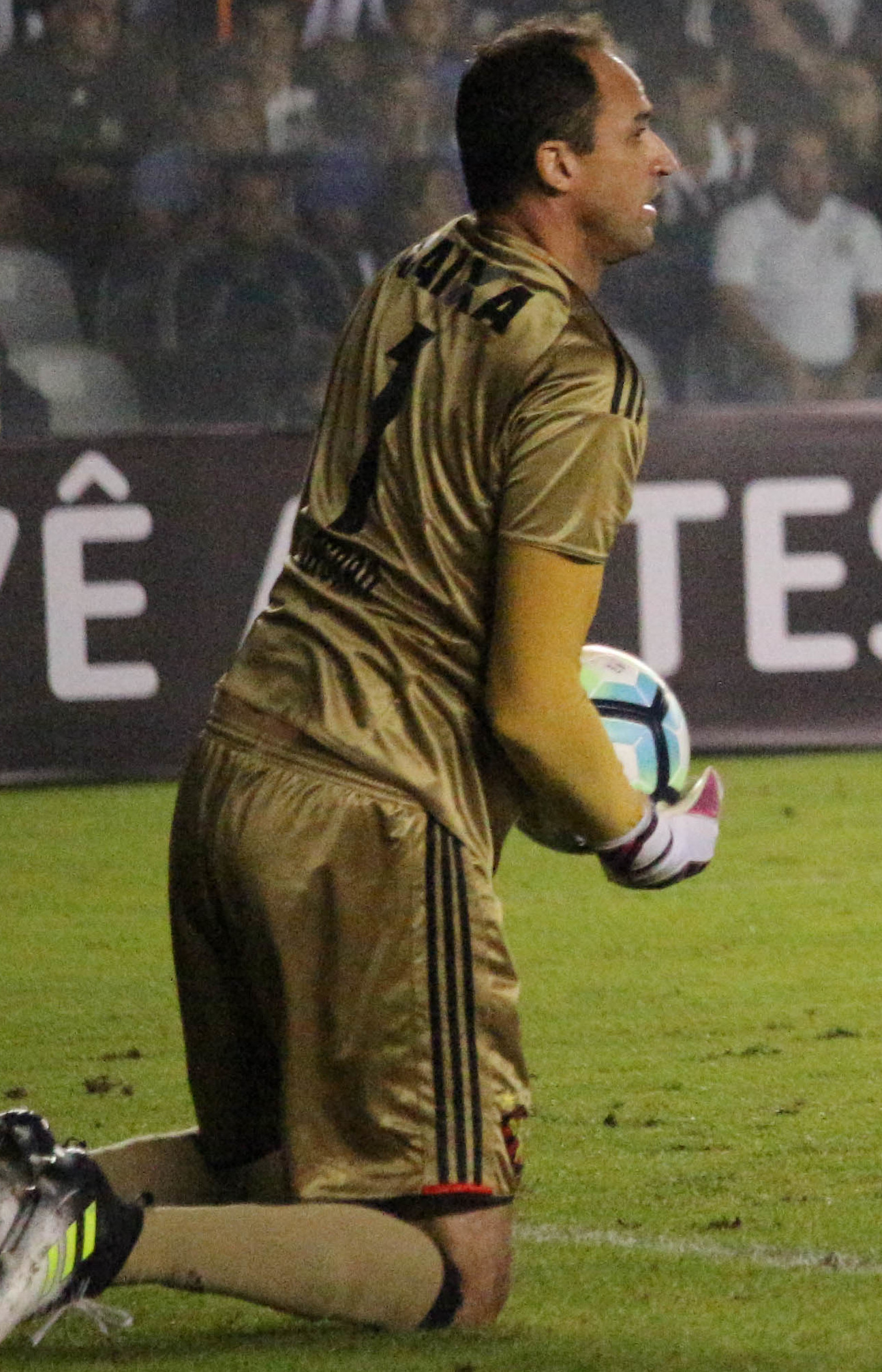 Foto: Douglas Teixeira/Futebol Santista